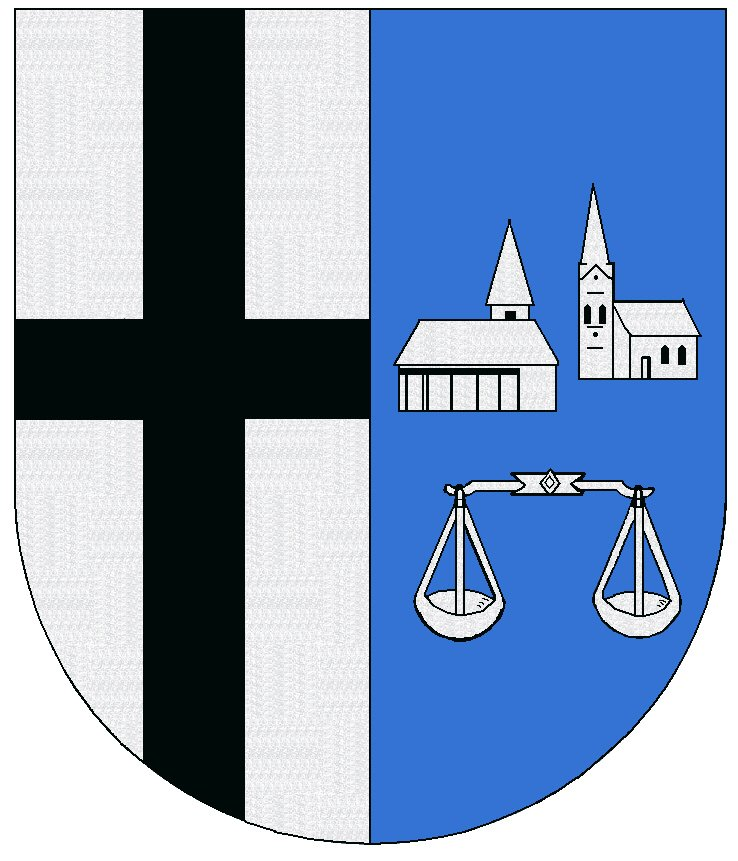 Wappen von Biebern